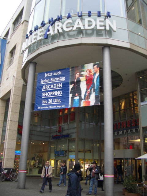 Einkaufszentrum, Schönhauser Allee, Berlin